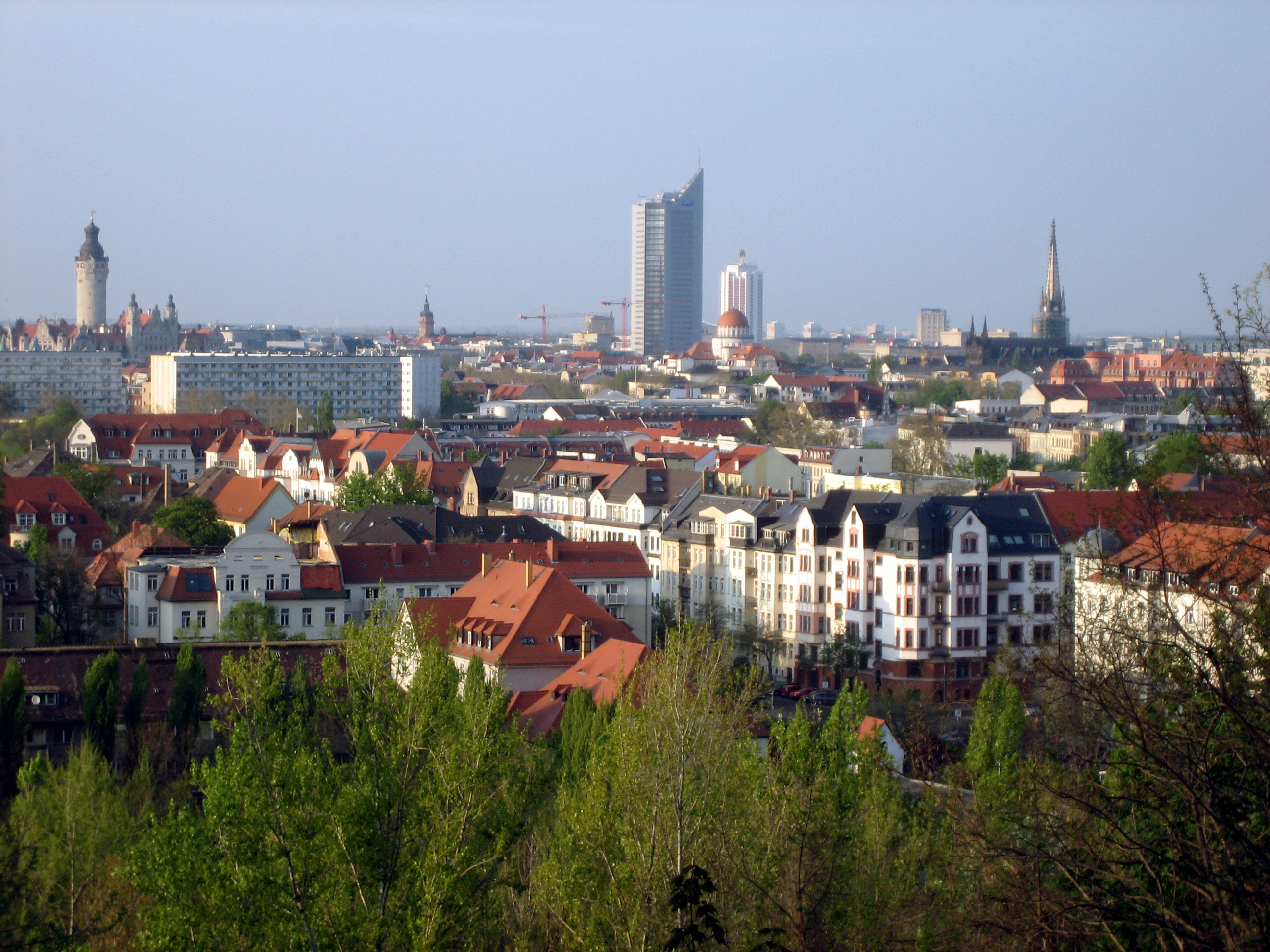 Blick vom Fockeberg auf die Leipziger Innenstadt